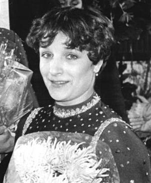 Jelena Walowa, Oleg Wasslijew ADN-ZB Thieme 29.3.83 Karl-Marx-Stadt: ISU-Schaulauf-Tournee- Die Weltmeister und Vize-Europameister im Paarlauf Jelena Walowa-Oleg Wasslijew aus der UdSSR begeisterten am Abend den 28.3.1983 in Karl-Marx-Städter Publikum mit ihren Darbietungen.